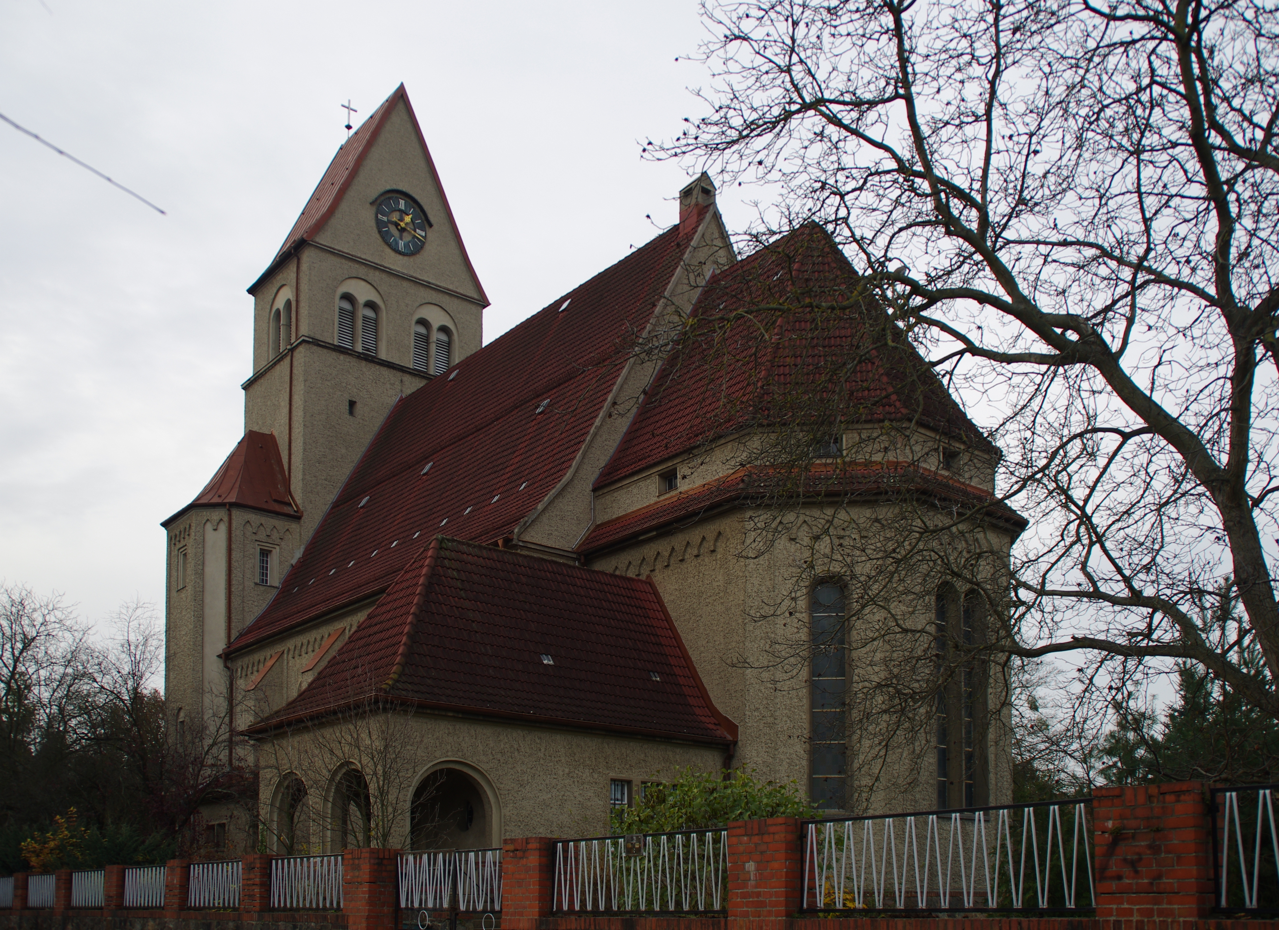 Wriezen in Brandenburg. Die katholische Kirche in der Freienwalder Straße 40 steht unter Denkmalschutz.